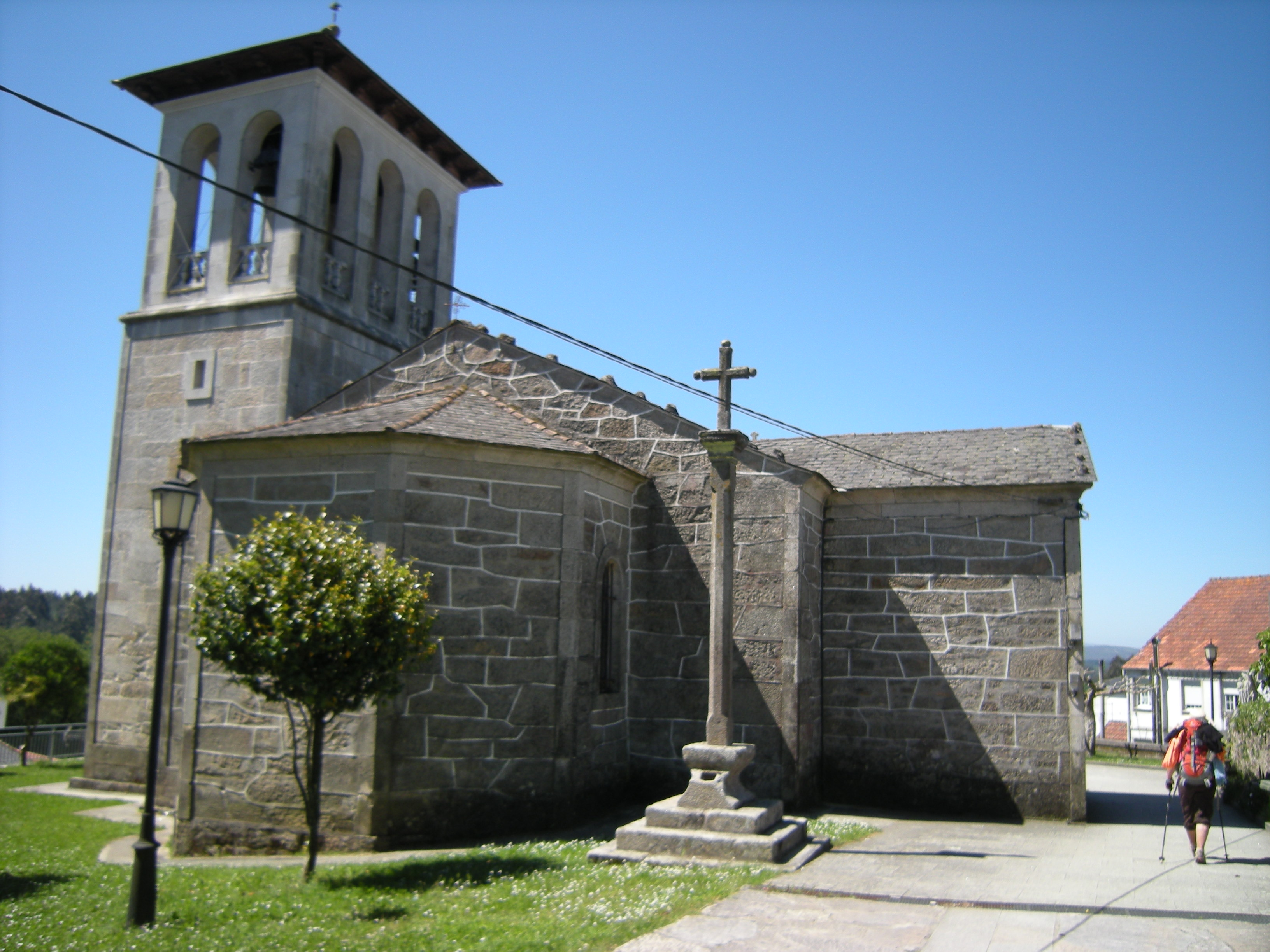 De su primitiva traza románica tan solo conserva parte de la fachada occidental con su portada.